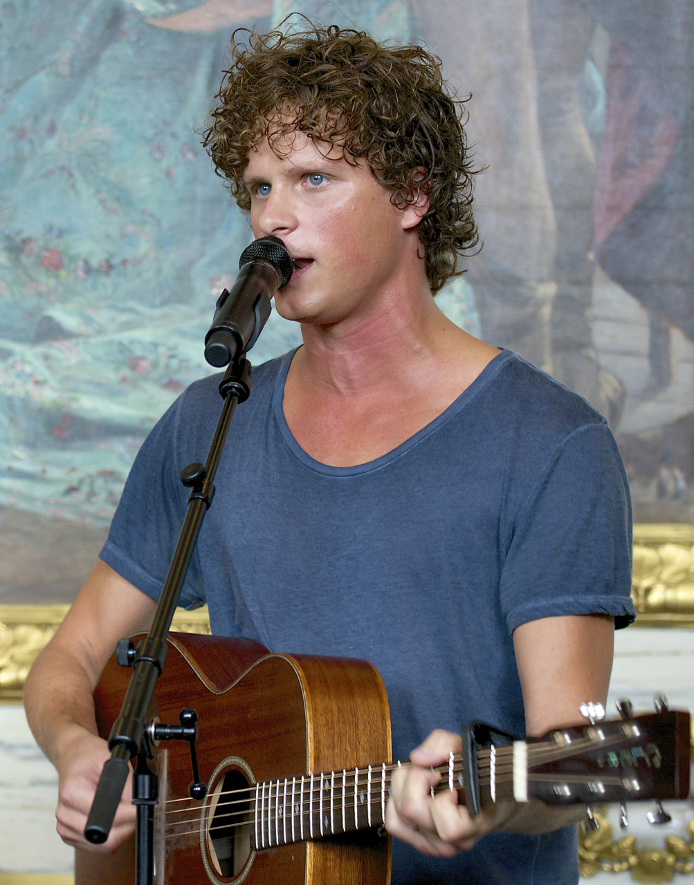 Adam Pålsson under Dramatens höstsamling 2014.